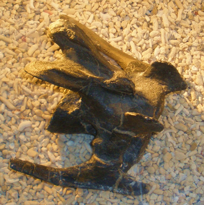 Fossil of Miragaia, an extinct stegosaur- Took the photo at Fossil Show, Munich